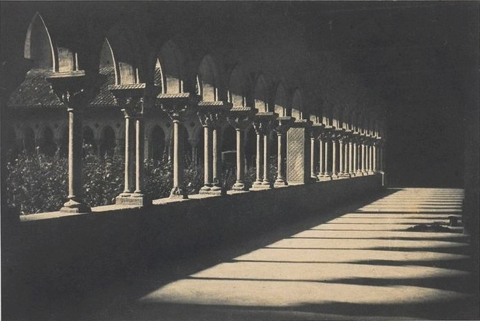 Vue intérieure d'une galerie du cloître, église Saint-Pierre (Moissac). Epreuve sur papier salé à partir d'un négatif papier ciré sec. 23,2 x 34,5 cm. Photographie prise pour la Mission Héliographique. Collection du musée d'Orsay.